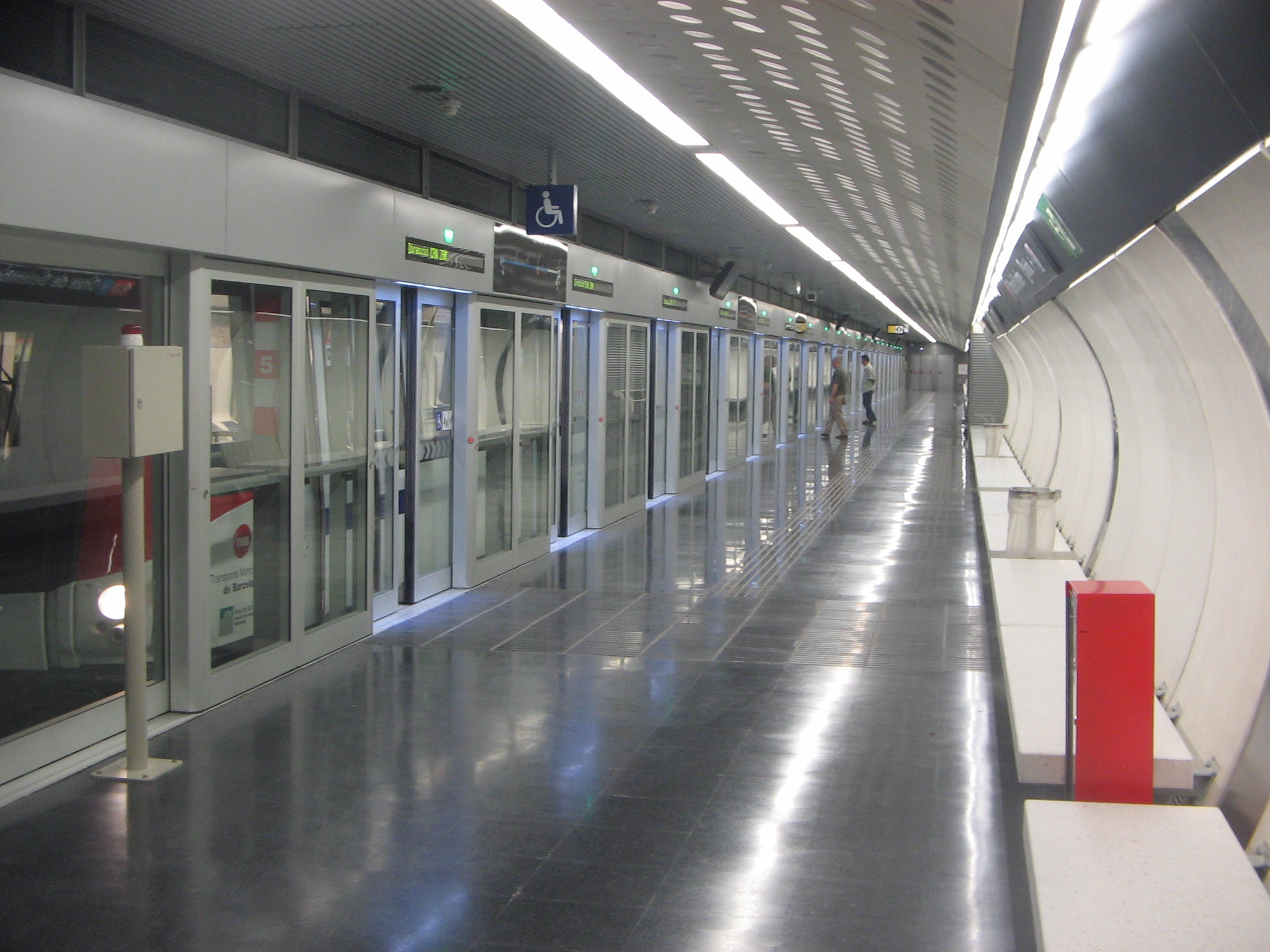 Andana a l'estació d'Onze de Setembre direcció Can Zam/Gorg.